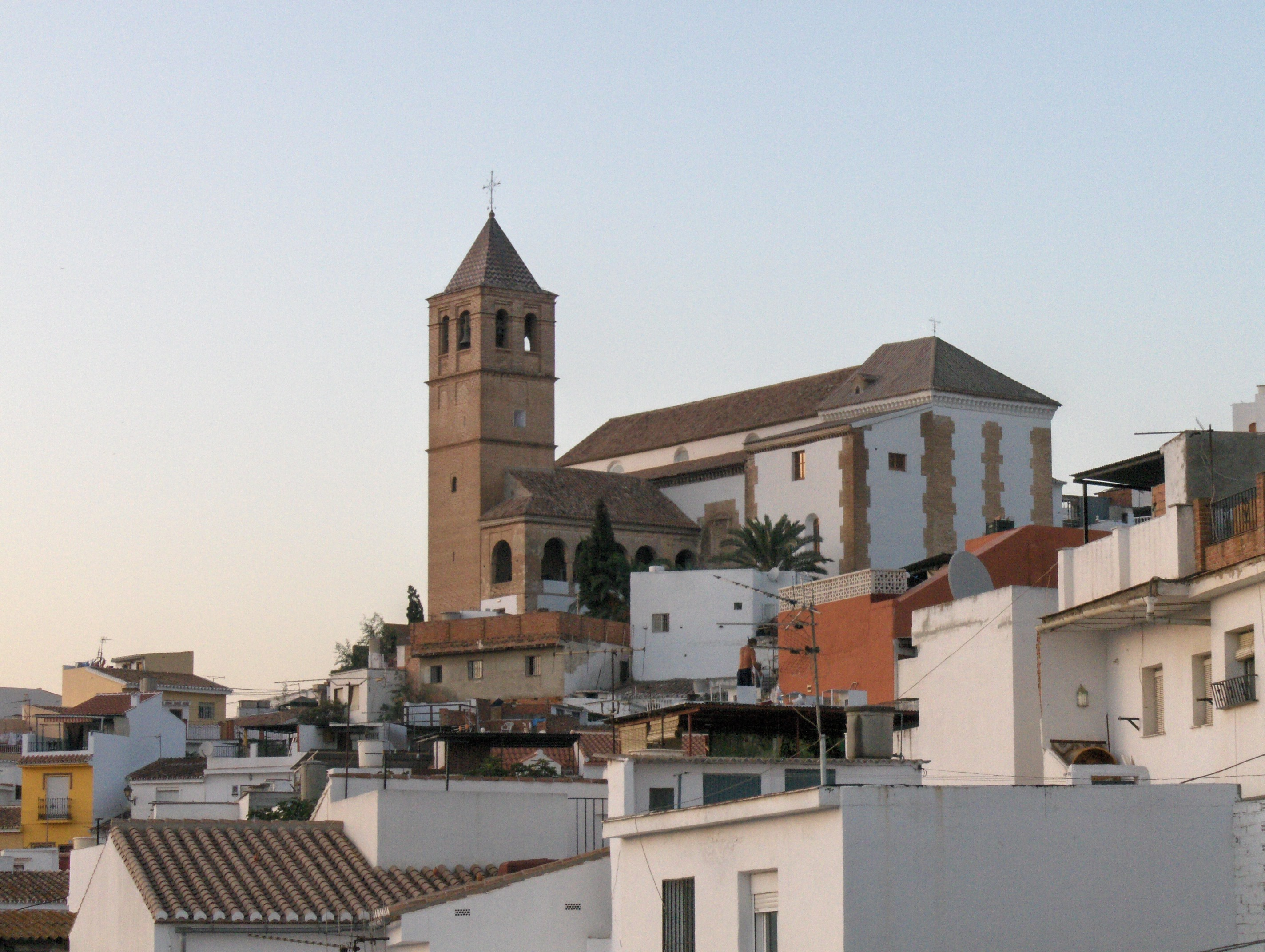 Iglesia de Santa María la Mayor, Vélez-Málaga, España.